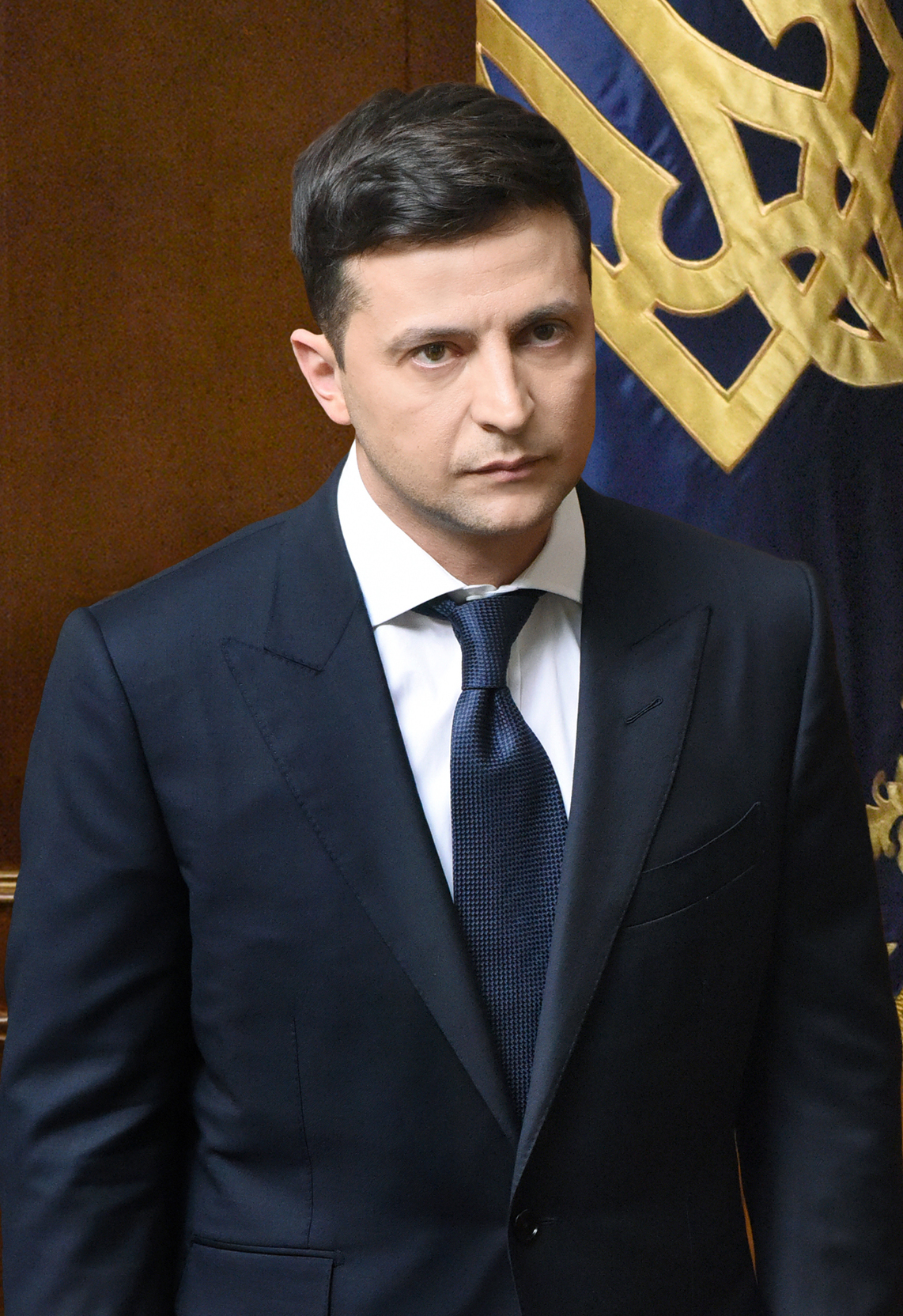 Официальный портрет Президента Украины Зеленского Владимира Александровича